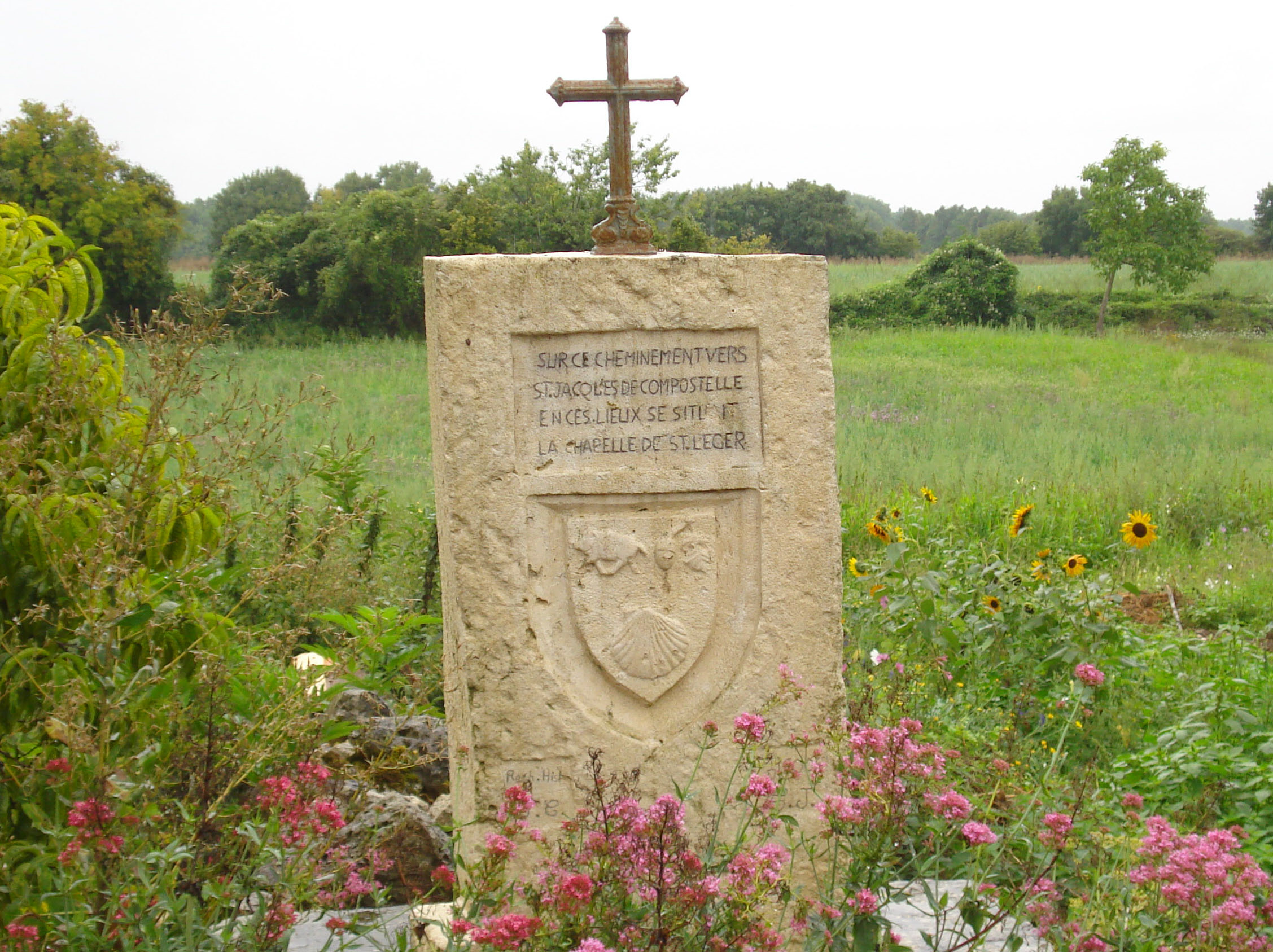 La borne de Saint-Léger présente sur l'emplacement d'une ancienne chapelle dans la commune de Saint-Mandé-sur-Brédoire.